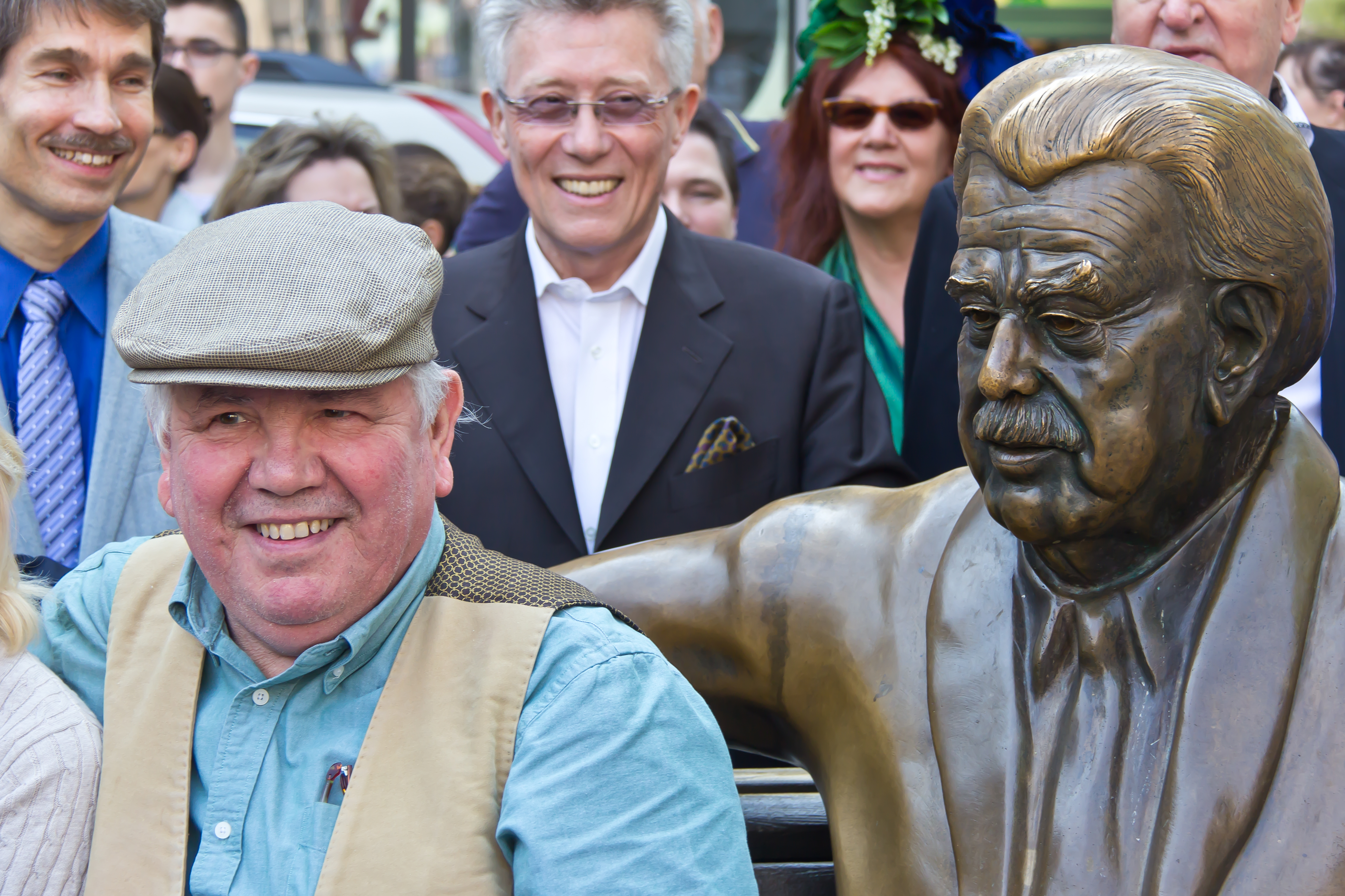 Enthüllung des Willy-Millowitsch-Denkmals auf dem Willy-Millowitsch-Platz (nach dem Umzug vom Eisenmarkt) durch Bürgermeisterin Elfi-Scho-Antwerpers, Peter Millowitsch und Bezirksbürgermeister Andreas Hupke (Stadtbezirk Köln-Innenstadt) Foto: Peter Millowitsch sitzt auf dem Willy-Millowitsch-Denkmal